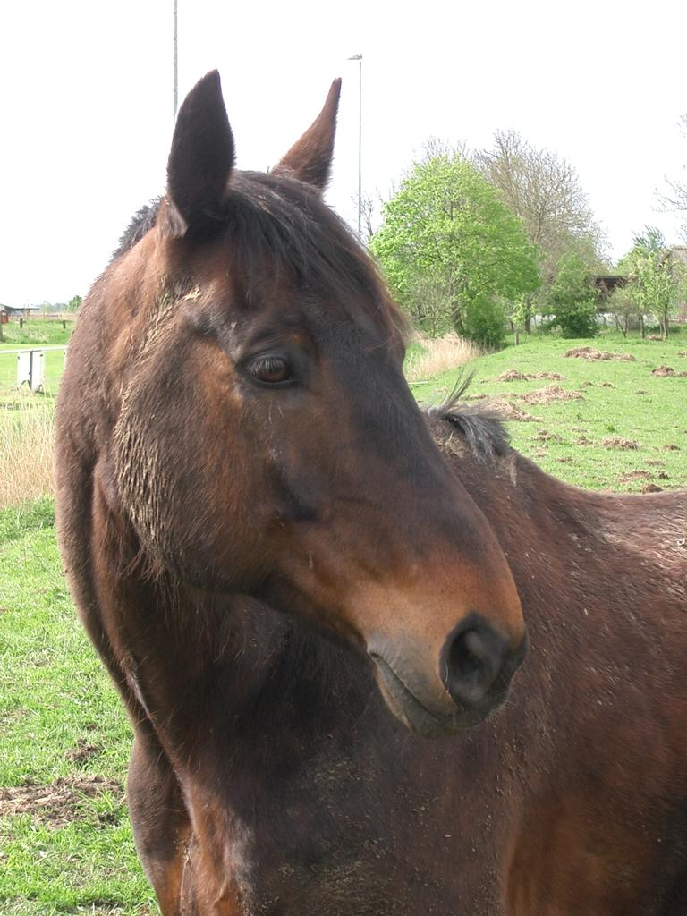 Dunkelbrauner im Fellwechsel. Gut zu erkennen das bei diesem Tier dunklere Winterfell und das schon teilweise durchkommende hellere Sommerfell.